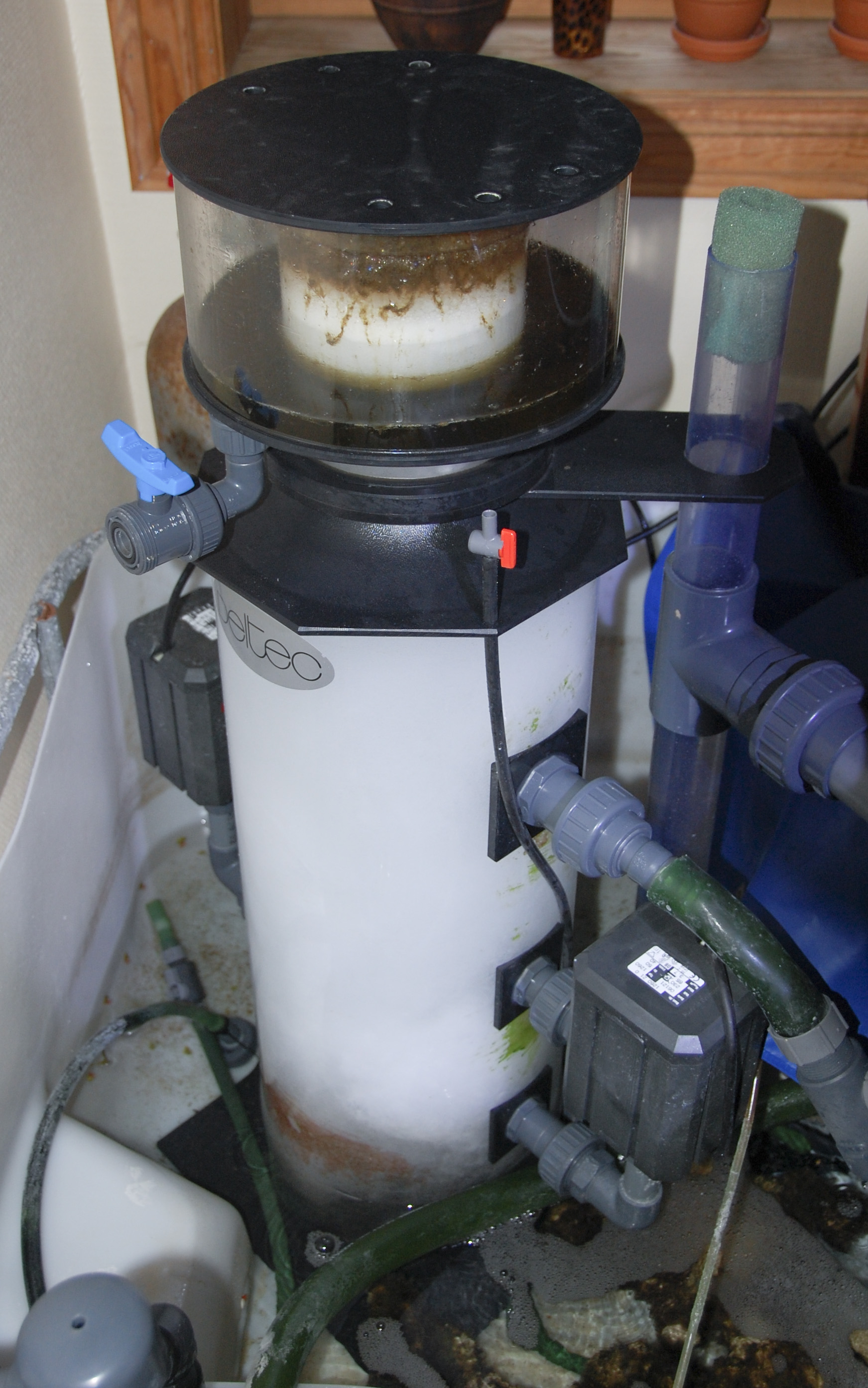 Deltec AP 902 skimmer.